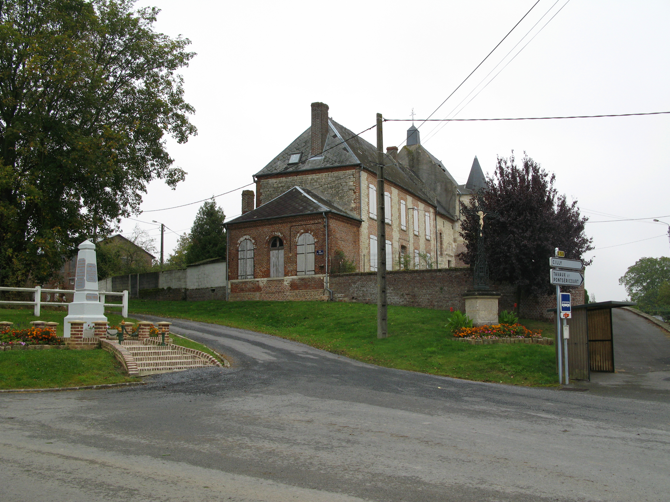 Montigny-sous-Marle (Aisne, France) - L'église et le monument-aux-morts.